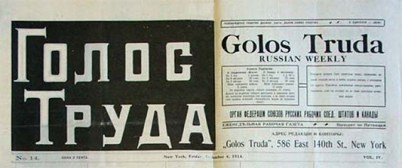 Golos Truda, numéro 14 du 4 décembre 1914, hebdomadaire russe publié à New York.